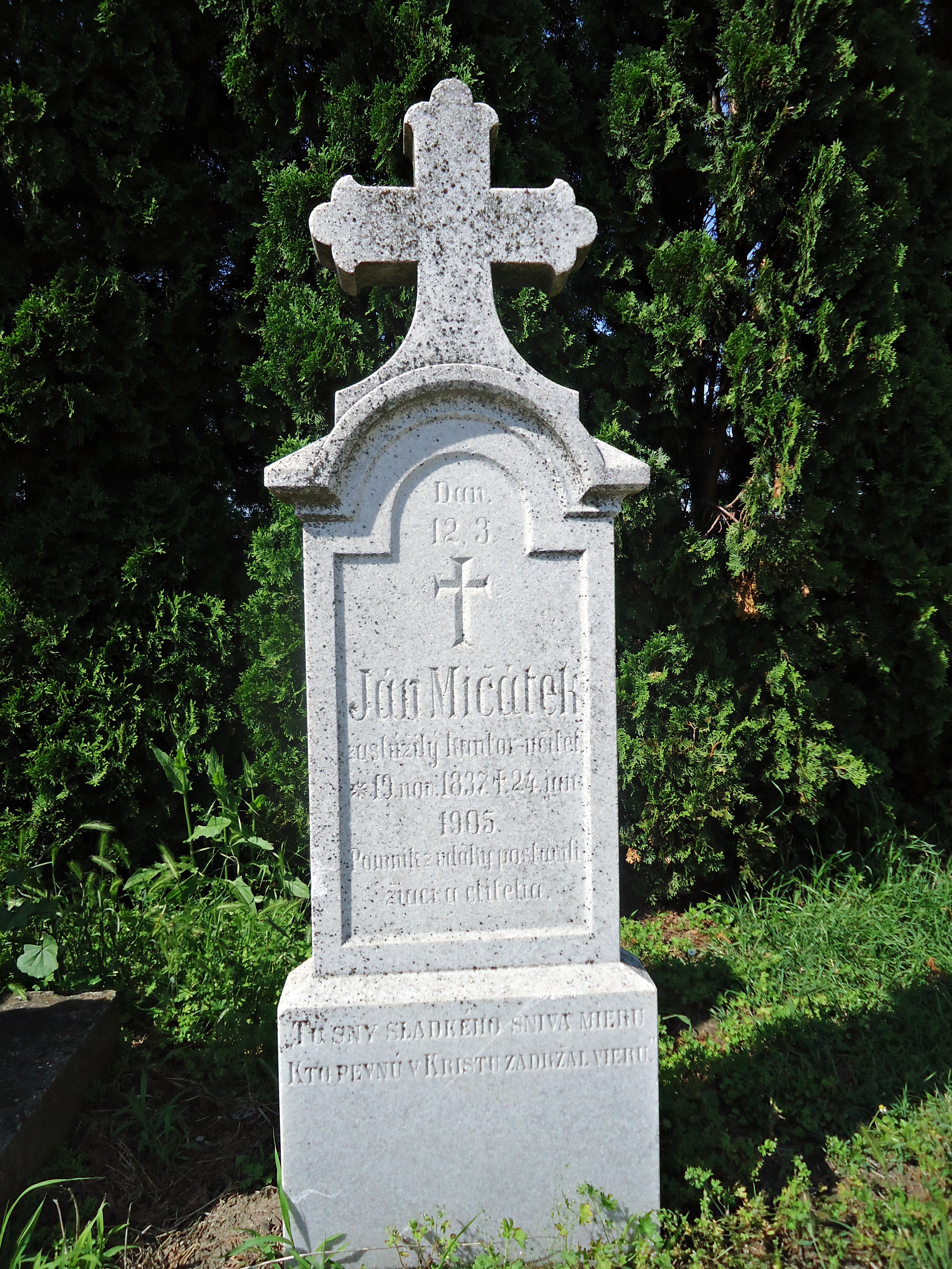 Nadhrobný pomník J. B. Mičátka na kysáčskom cintoríne